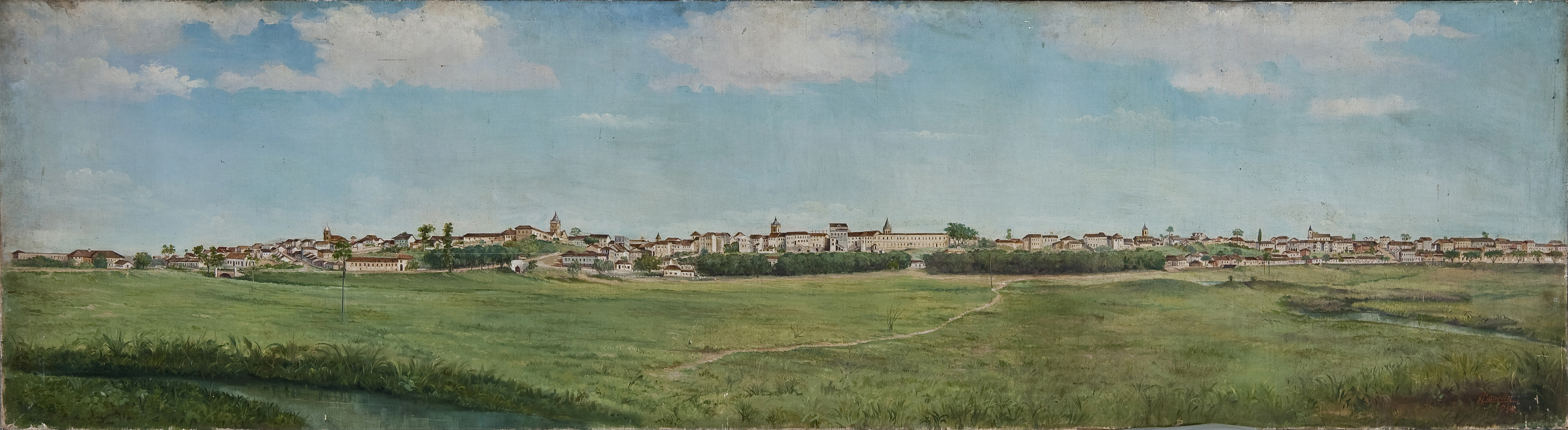 Obra que integra o acervo do Museu Paulista da USP. Coleção Fundo Museu Paulista - FMP